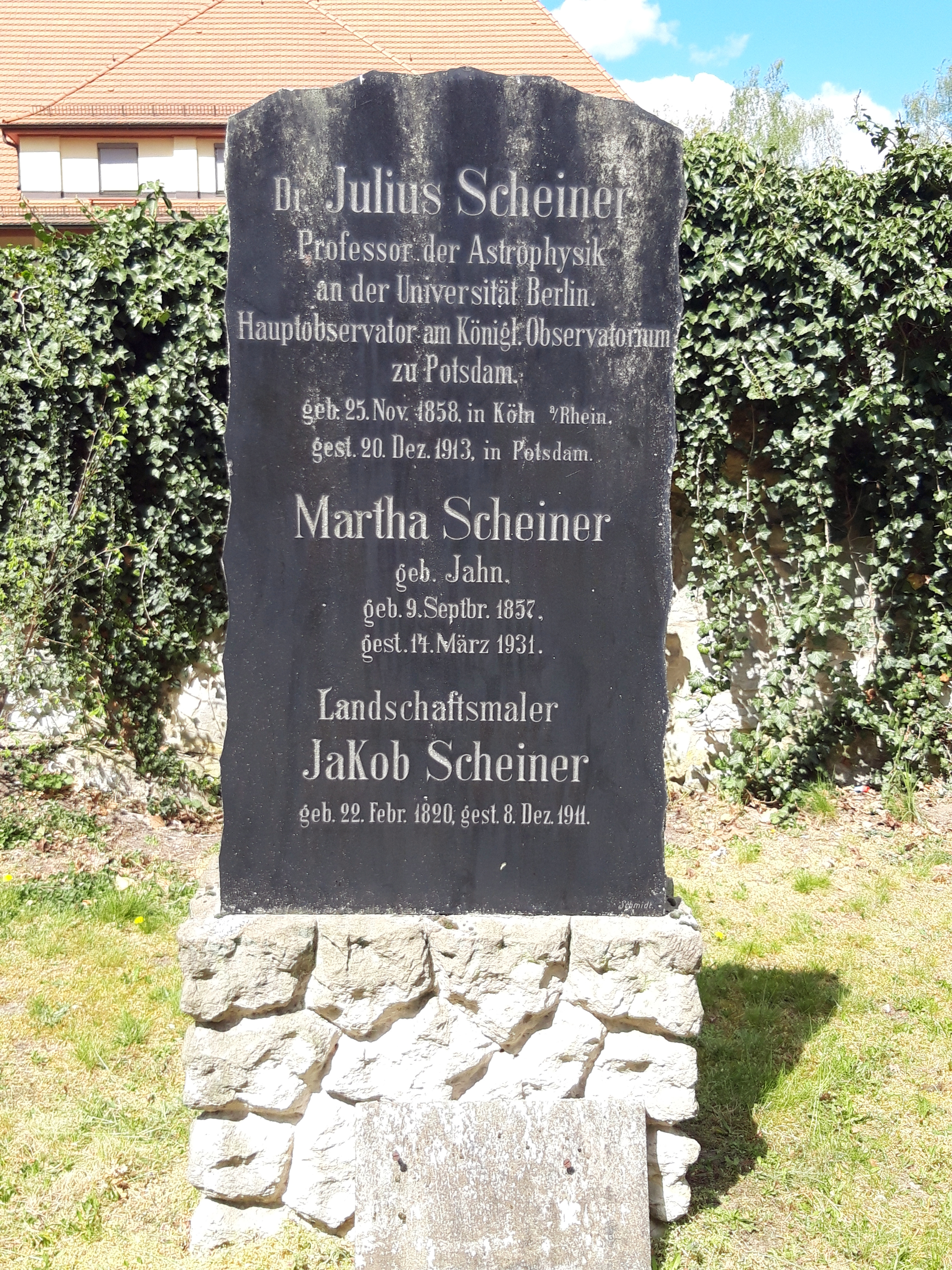 Historische Grab von Dr. Julius Scheiner auf dem Alten Friedhof Potsdam